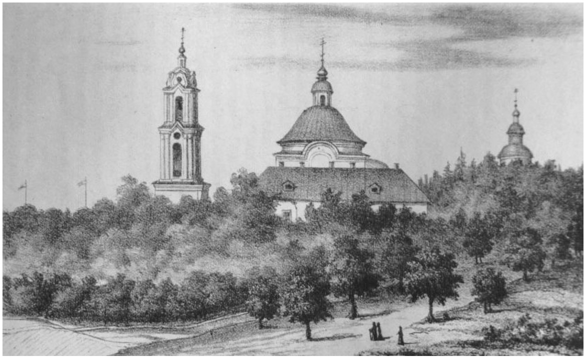 Вид Калужского Лаврентьевского монастыря с южной стороны в 1861 г. Рисунок середины XIX века.